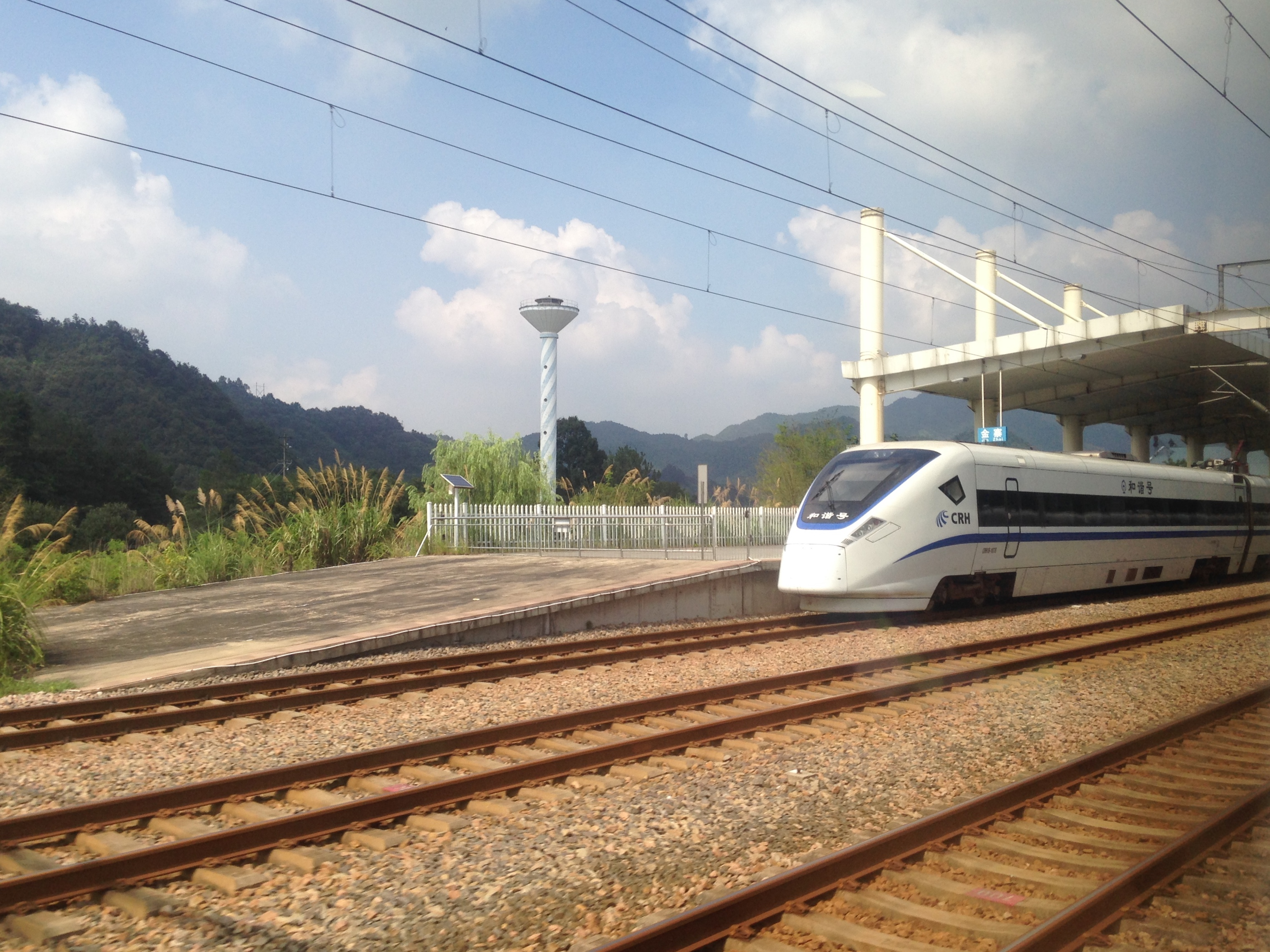 合武鉄路の列車内より望む金寨駅